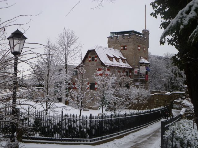 sog. Freyschlößl/Mayerei am rothen Thurm